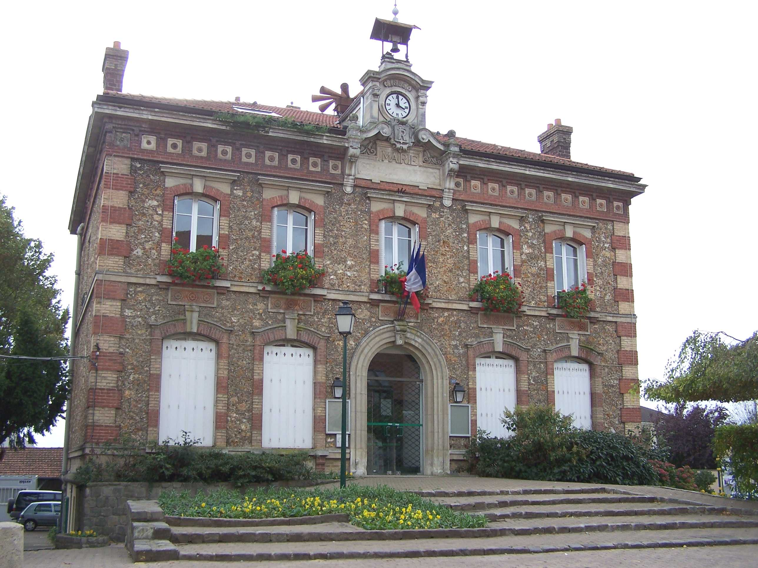 Mairie de Noisy-le-Roi (Yvelines, France)